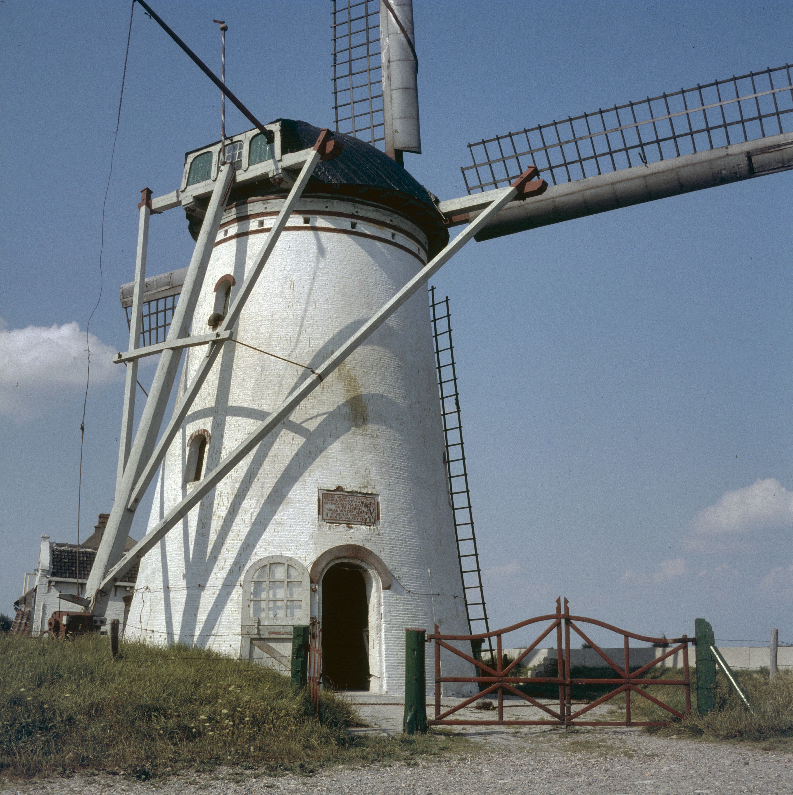 Ten-Bruggencatenummer: 01875: Overzicht molen (opmerking: Diacollectie Molens)